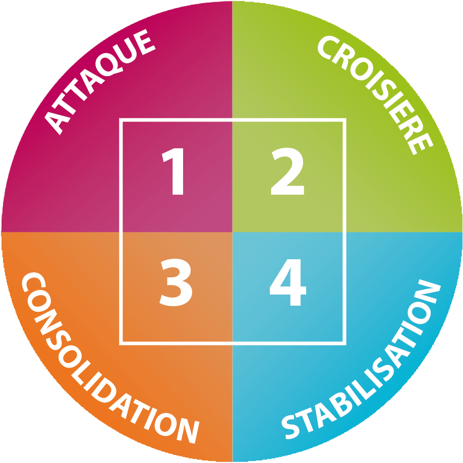 Les 4 phases, où les deux premières correspondent au processus strict pour perdre du poids rapidement et les deux dernières pour maintenir son poids idéal et ne pas récupérer de poids.